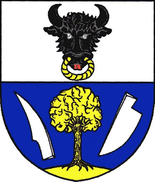 Znak obce Černovice